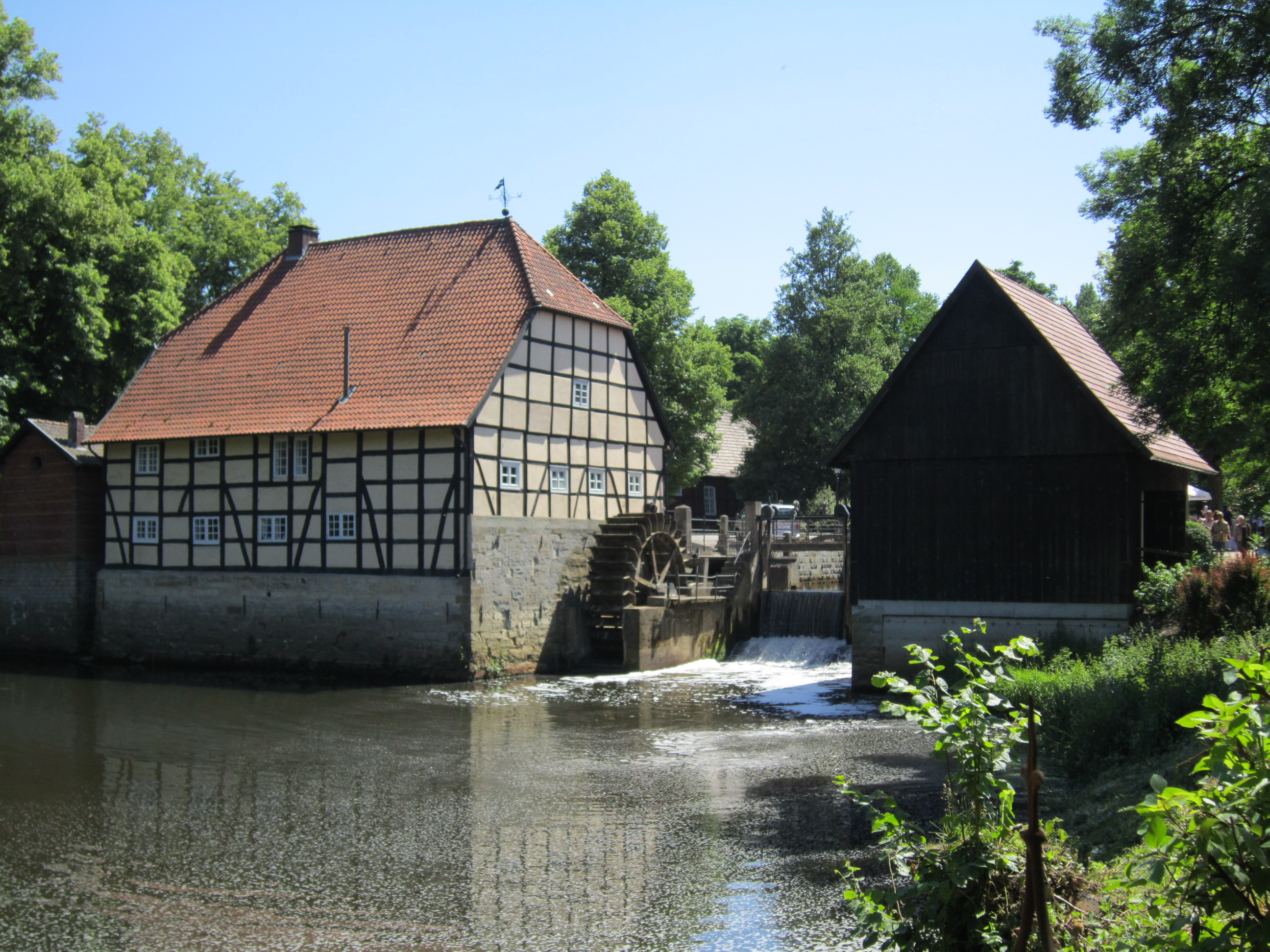 Wassermühle beim Schloss Rheda